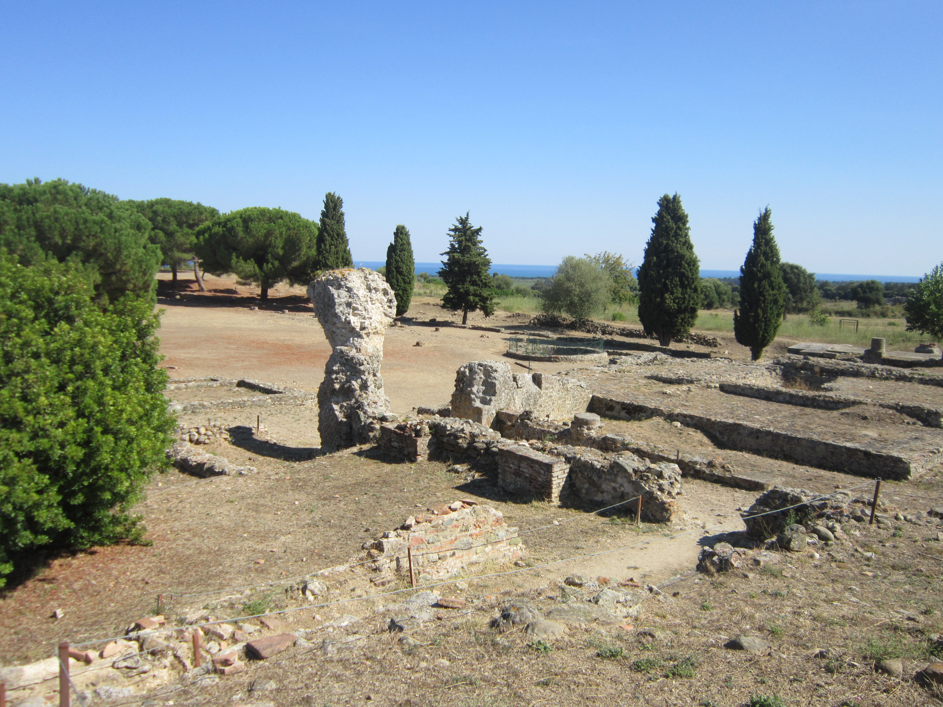 Ruines romaines d'Alalia